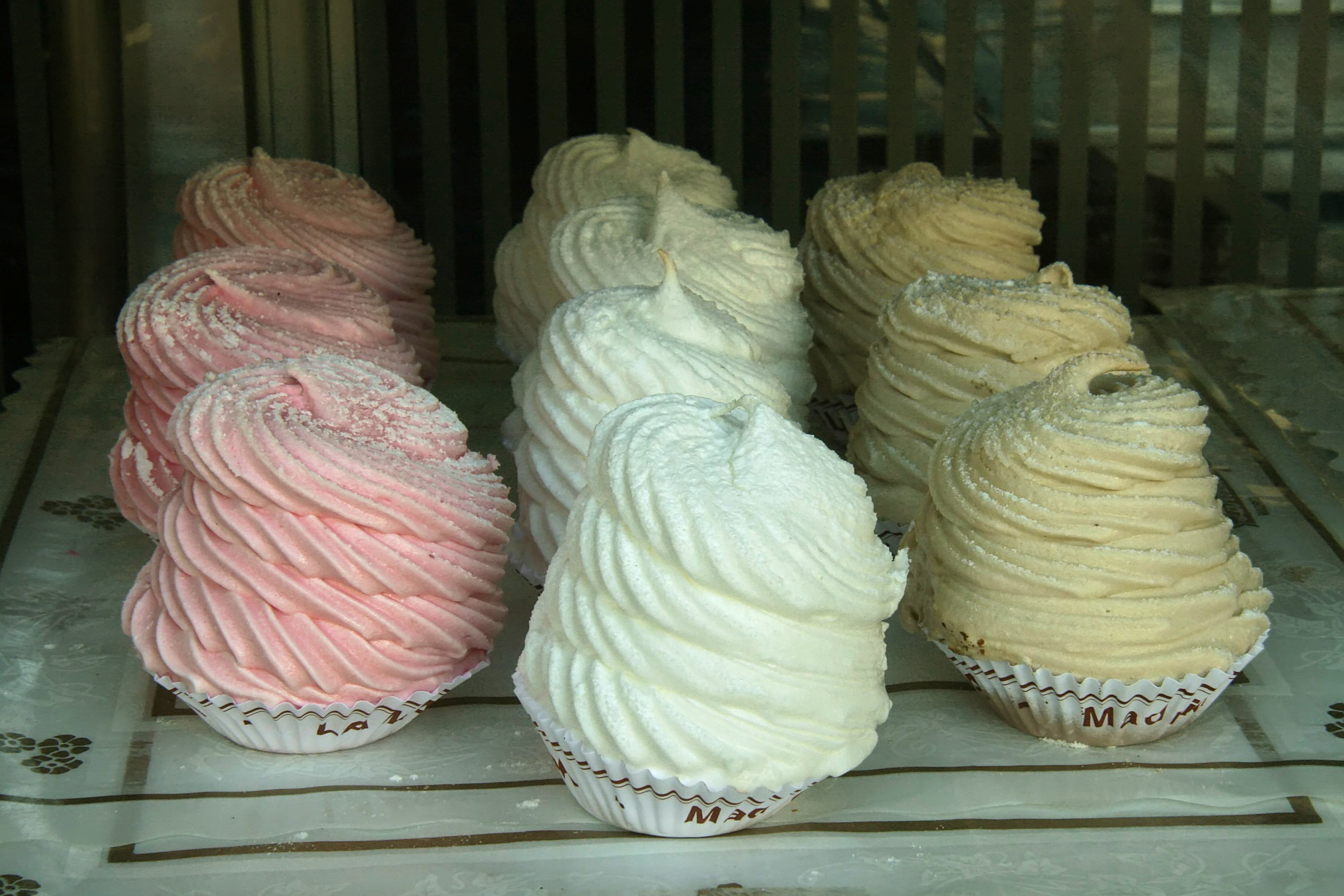 Merengues en sus tres colores típicos (La Mallorrquina)